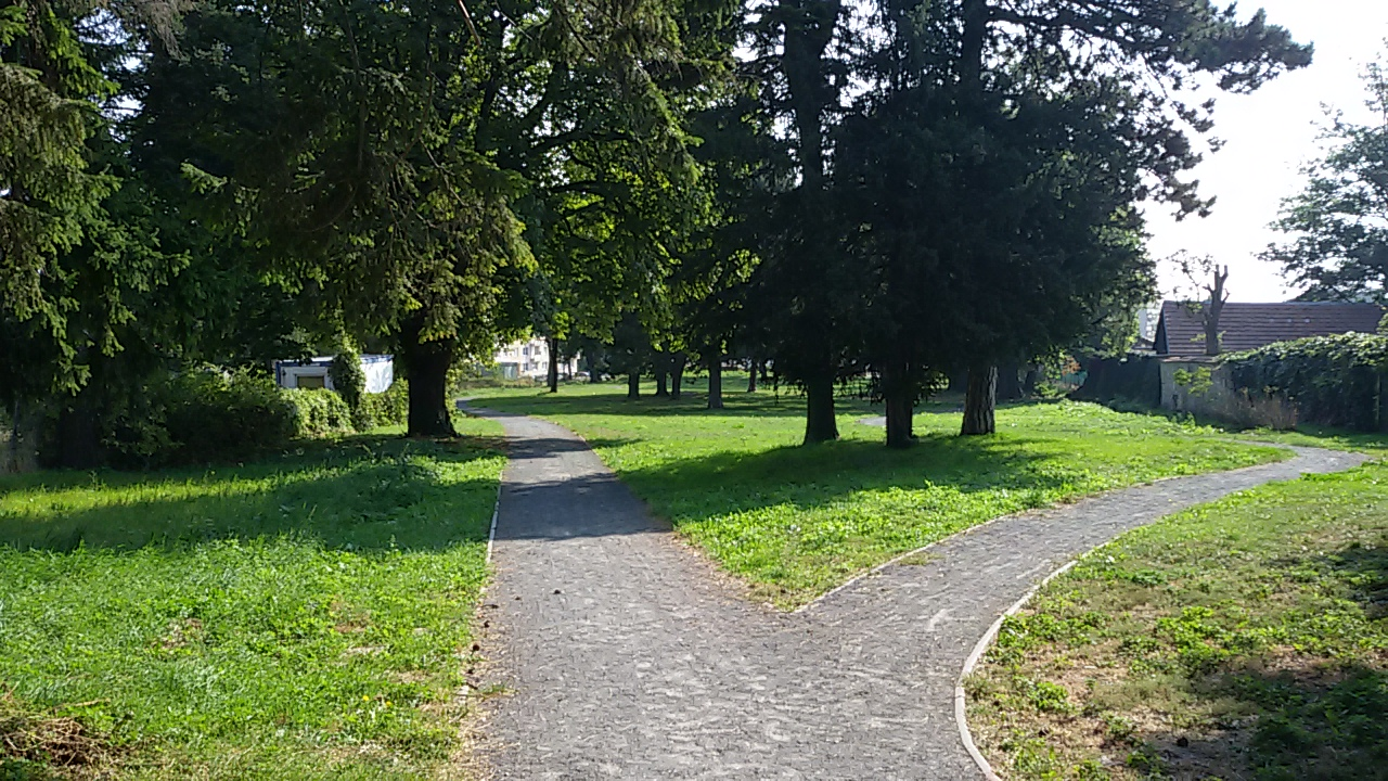 Pohľad na park od ulice SNP (september 2015)